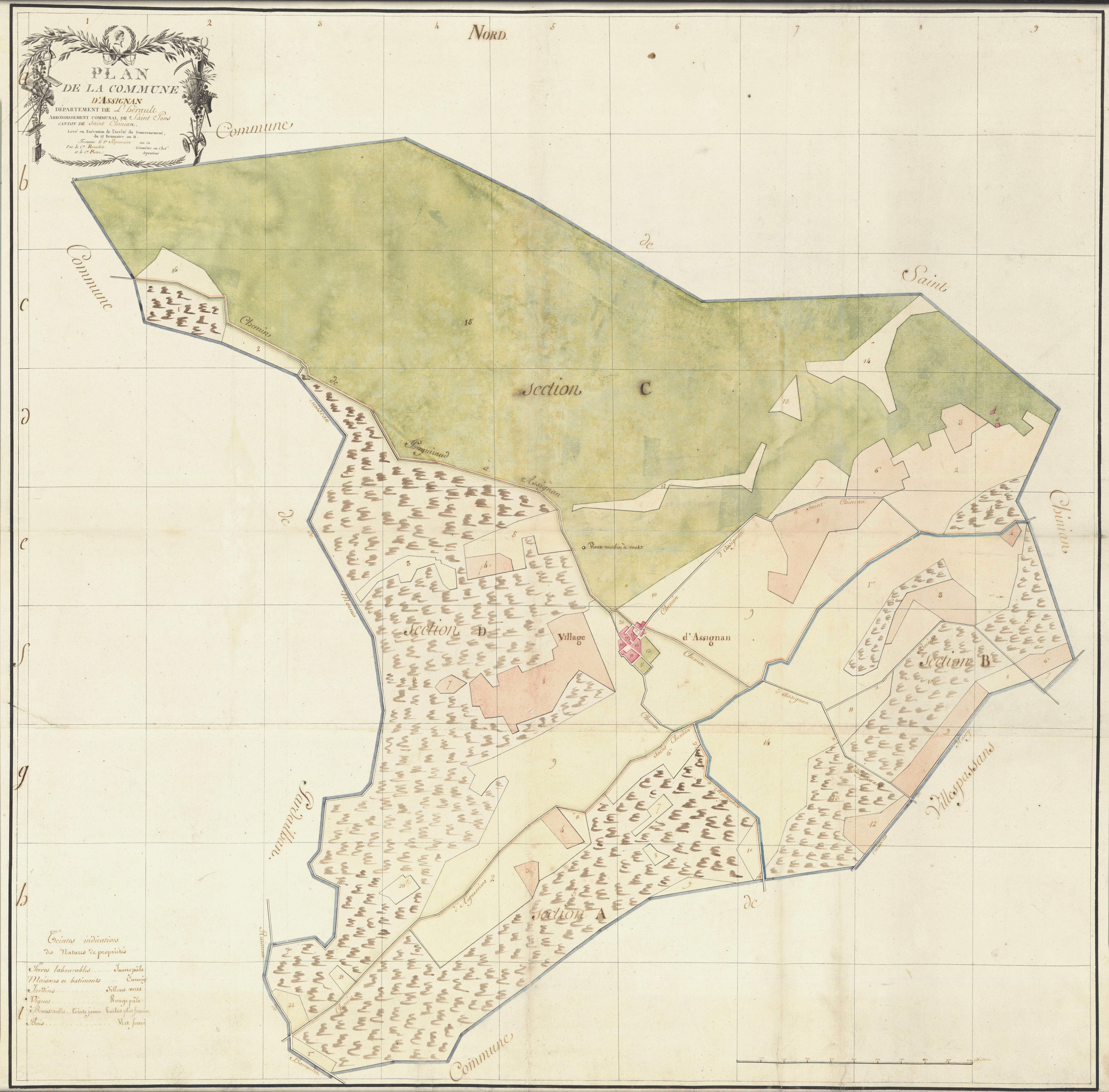 Assignan. - Plan par masse de culture (an XIII)